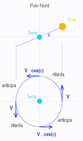 Interlingua: visione geocentrica del Sole